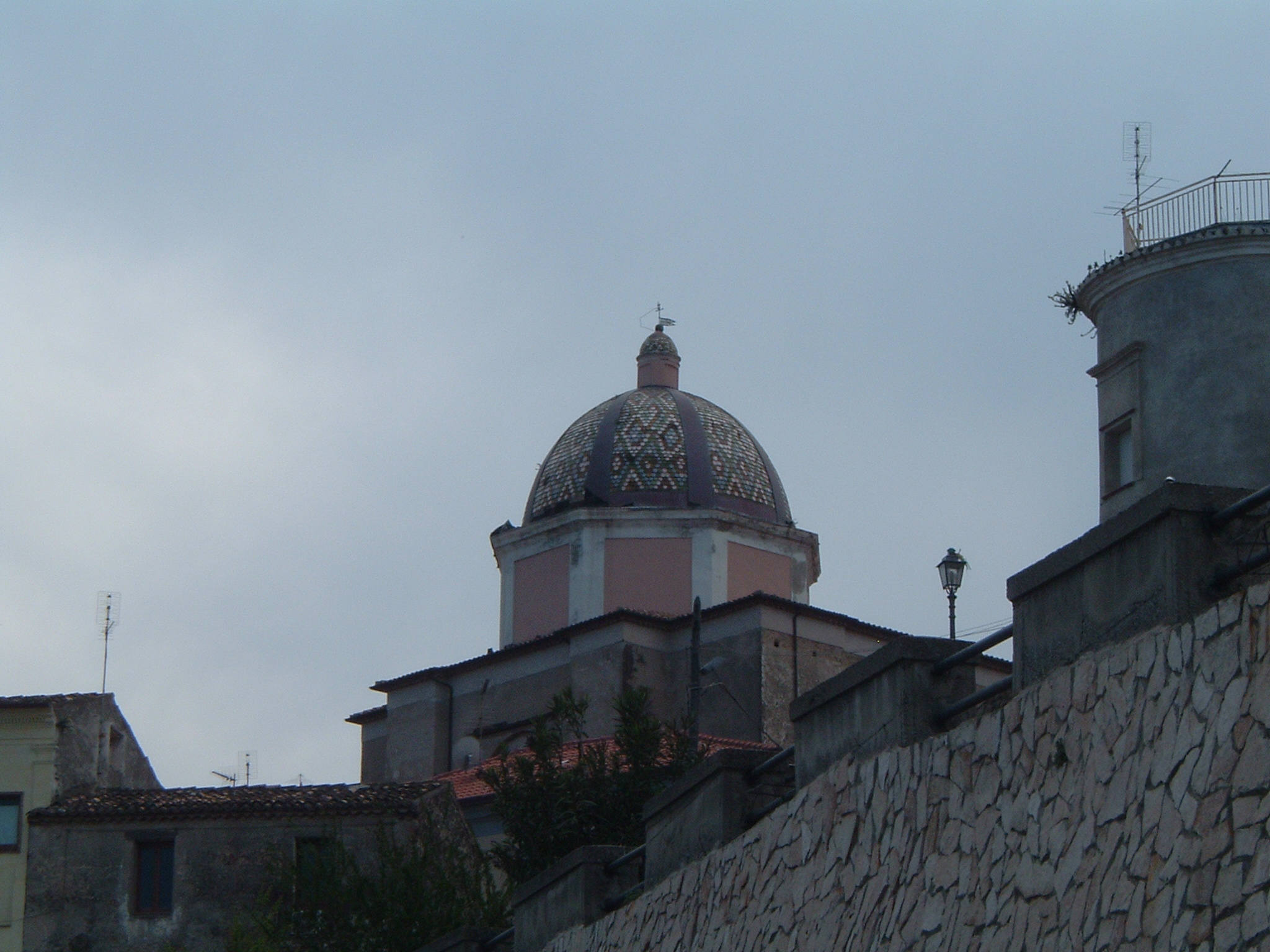 Scattata da Ippolito Leonardo (Utente:Vortix); macchina digitale propria; GFDL